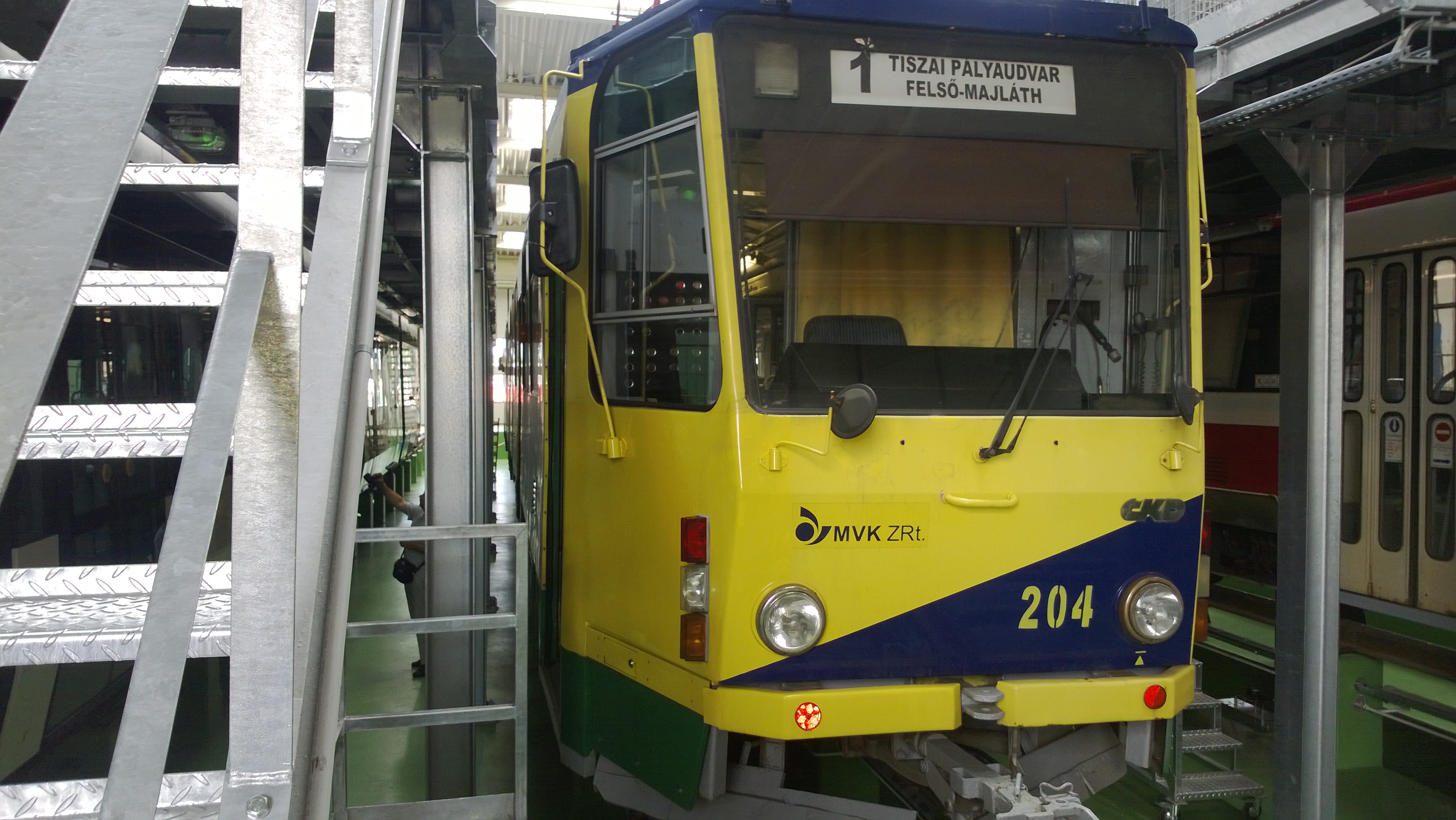 Miskolc járműállománya, Tátra villamos 204-es kocsi, a felújított remízben